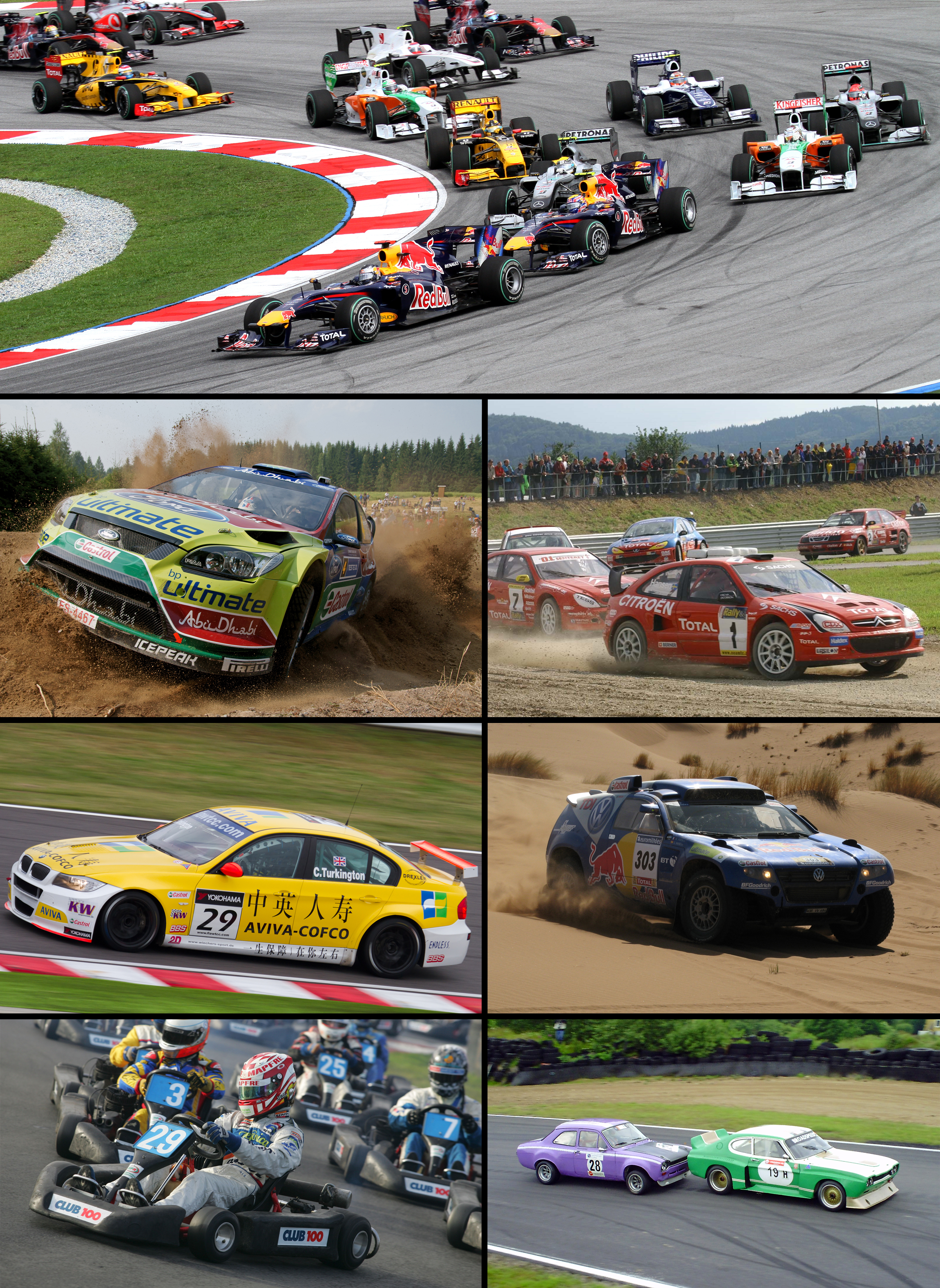 Auto sport montage